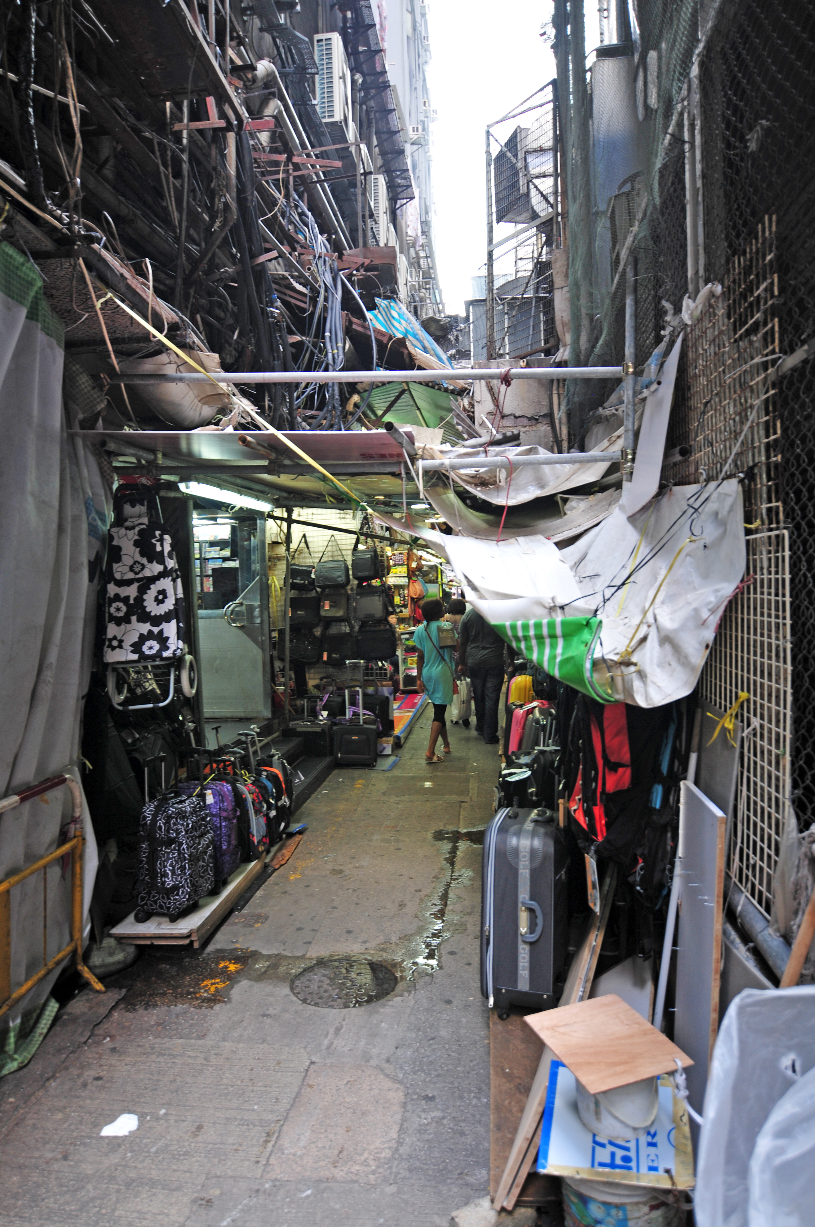 Wikimania 2013 Hongkong; Chungking Mansions Man bekommt als Reisender auch gleich passende Koffer.